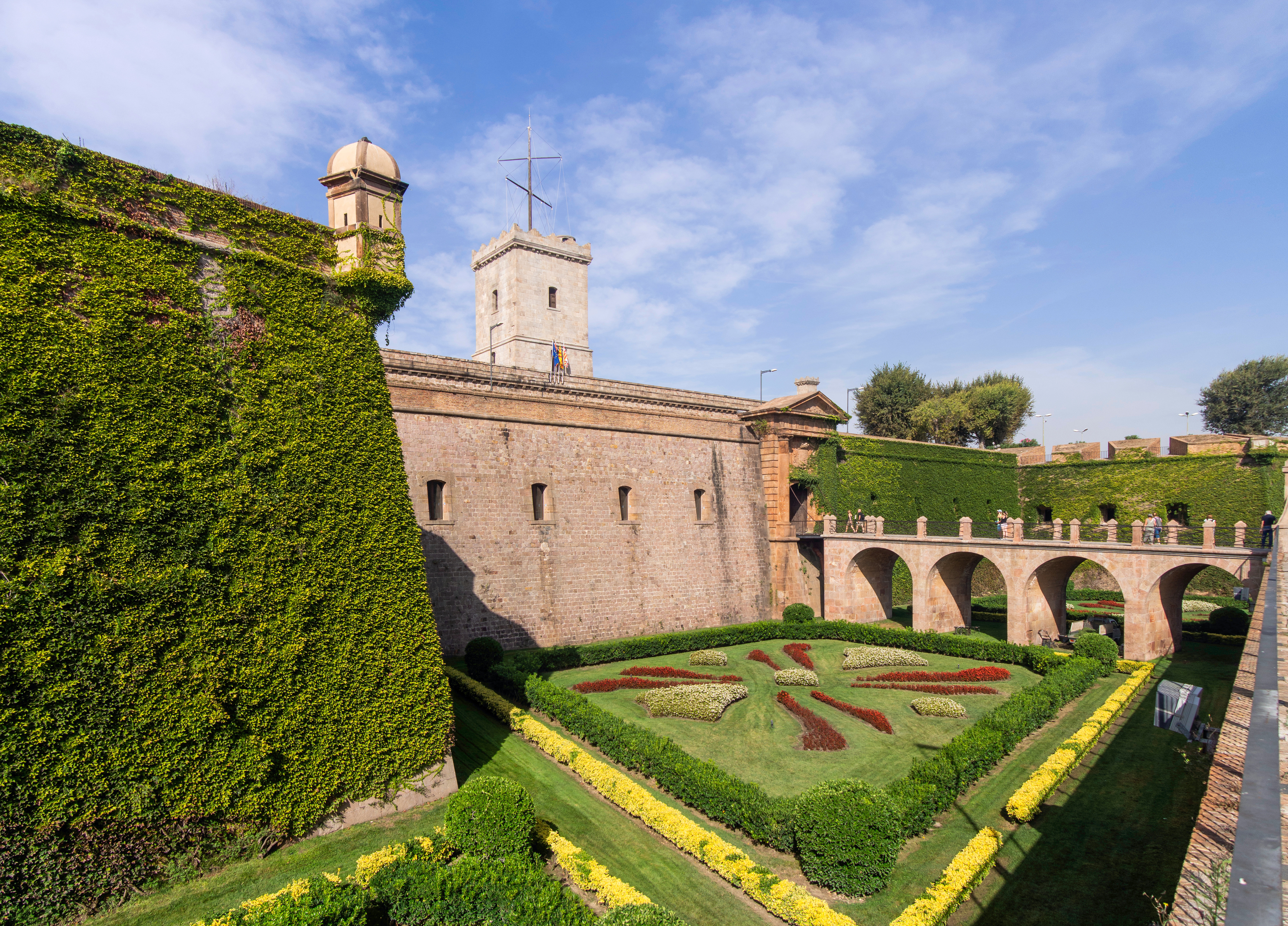 Castillo de Montjuic